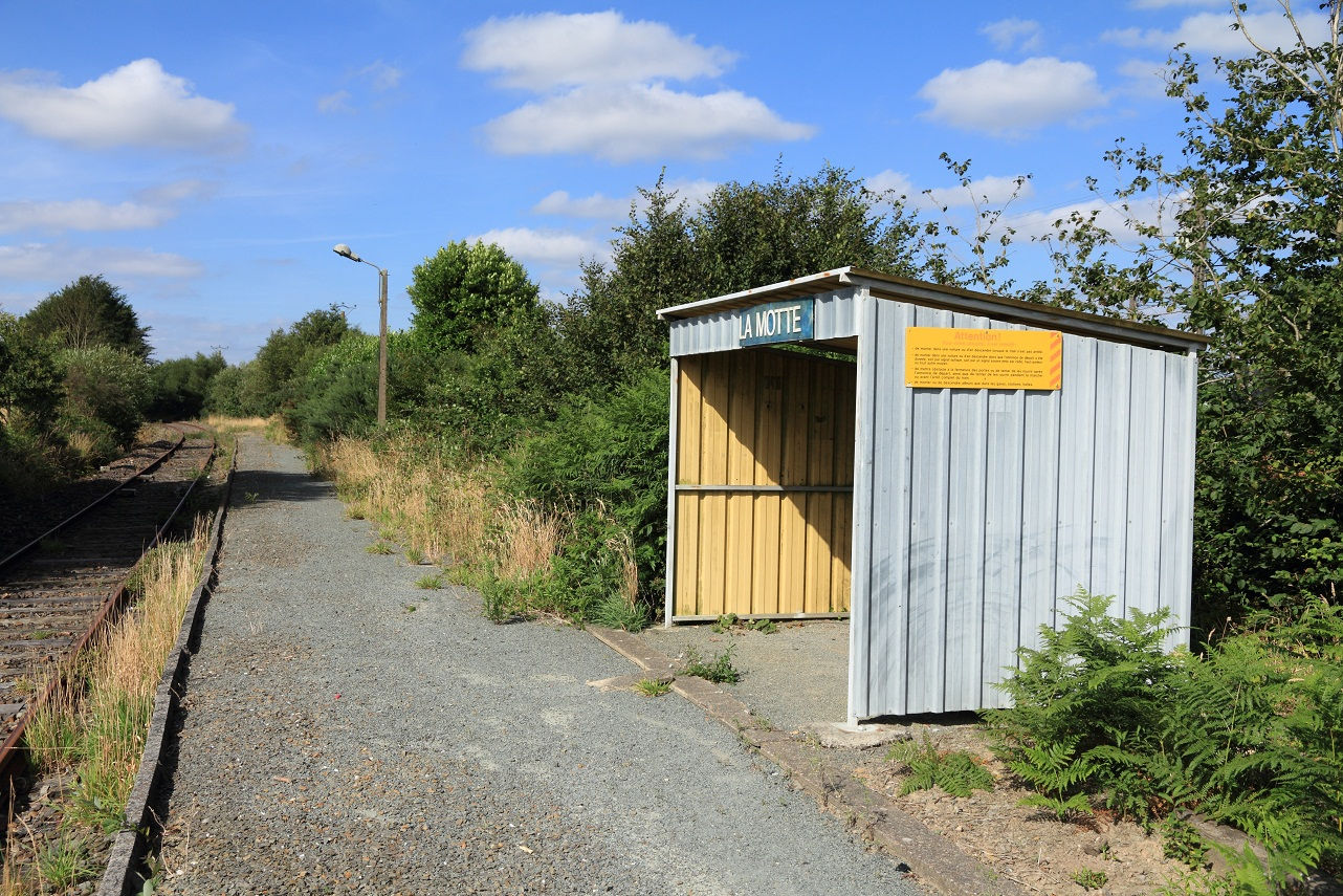 Vue de la gare de La Motte en juillet 2012, Bretagne, France.